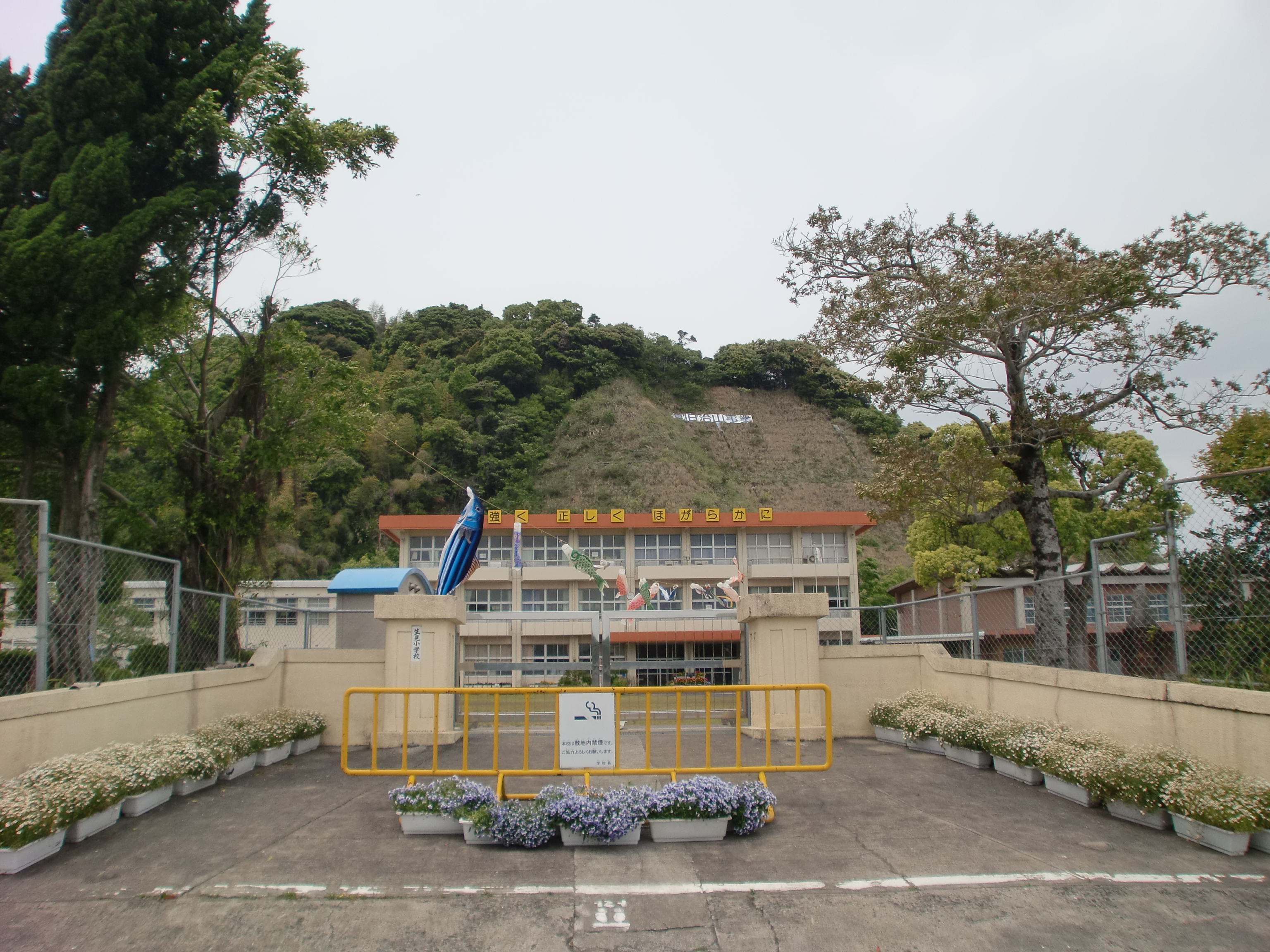 鹿児島市立生見小学校の外観。